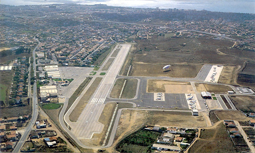 Aeródromo Municipal Cascais